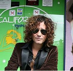 El cantante español Enrique Bunbury